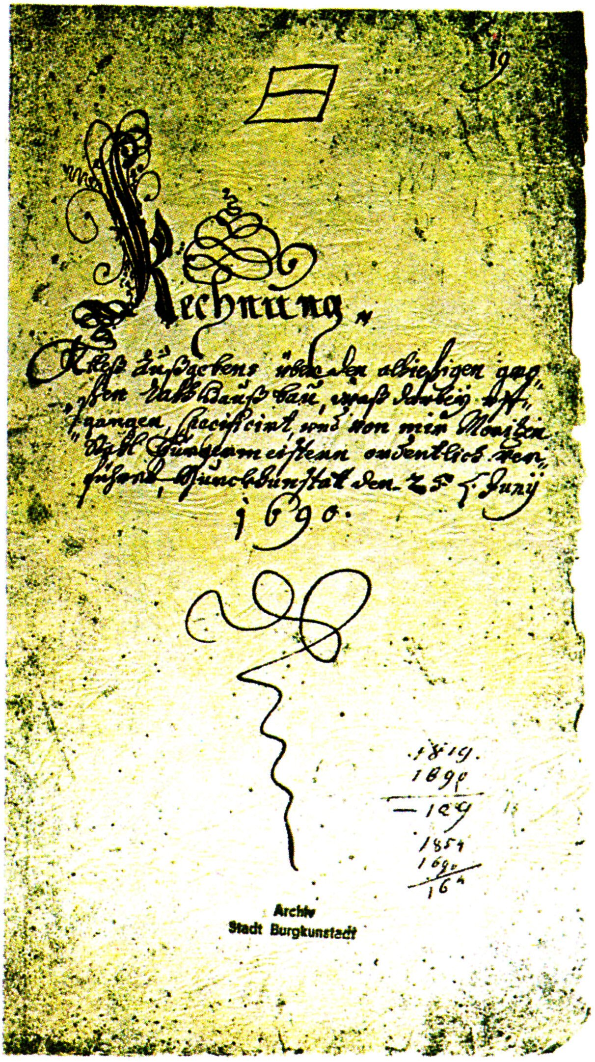 Die Rechung zum Burgkunstadter Rathausbau im Jahr 1690. Der Text lautet: Alleß Ausgegebens über den allhießigen großen Rathhausbau, was darbey uffgangen, spezifiziert und von mir, Moritzen Stahl, Bürgermeistern ordentlich verführet. Burchkunstatt, den 25. Juny 1690.